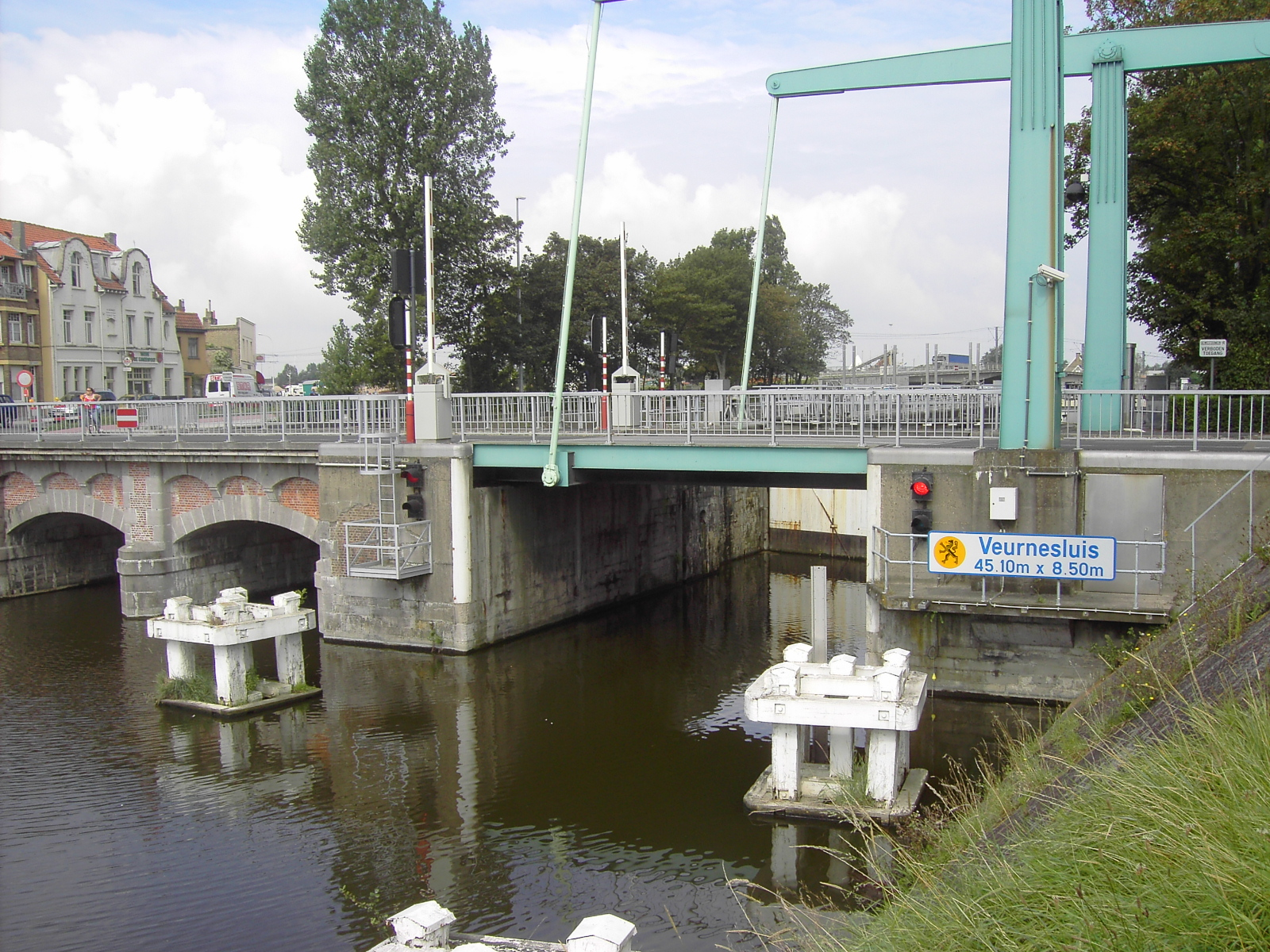 Algemeen zicht op de Veurnesluis, richting zwaaikom en de zee